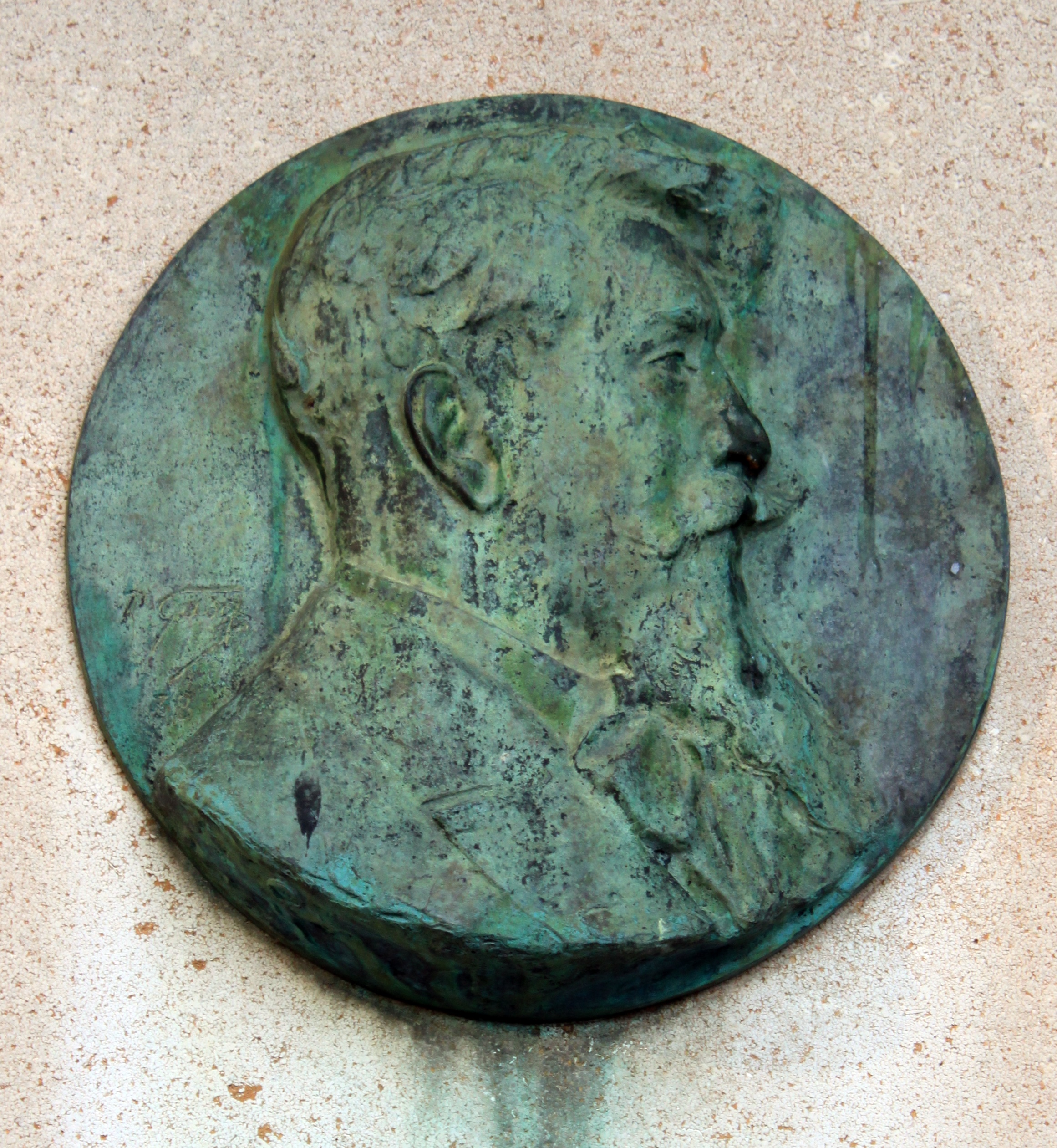 Jardin Darcy, Dijon, Bourgogne, FRANCE